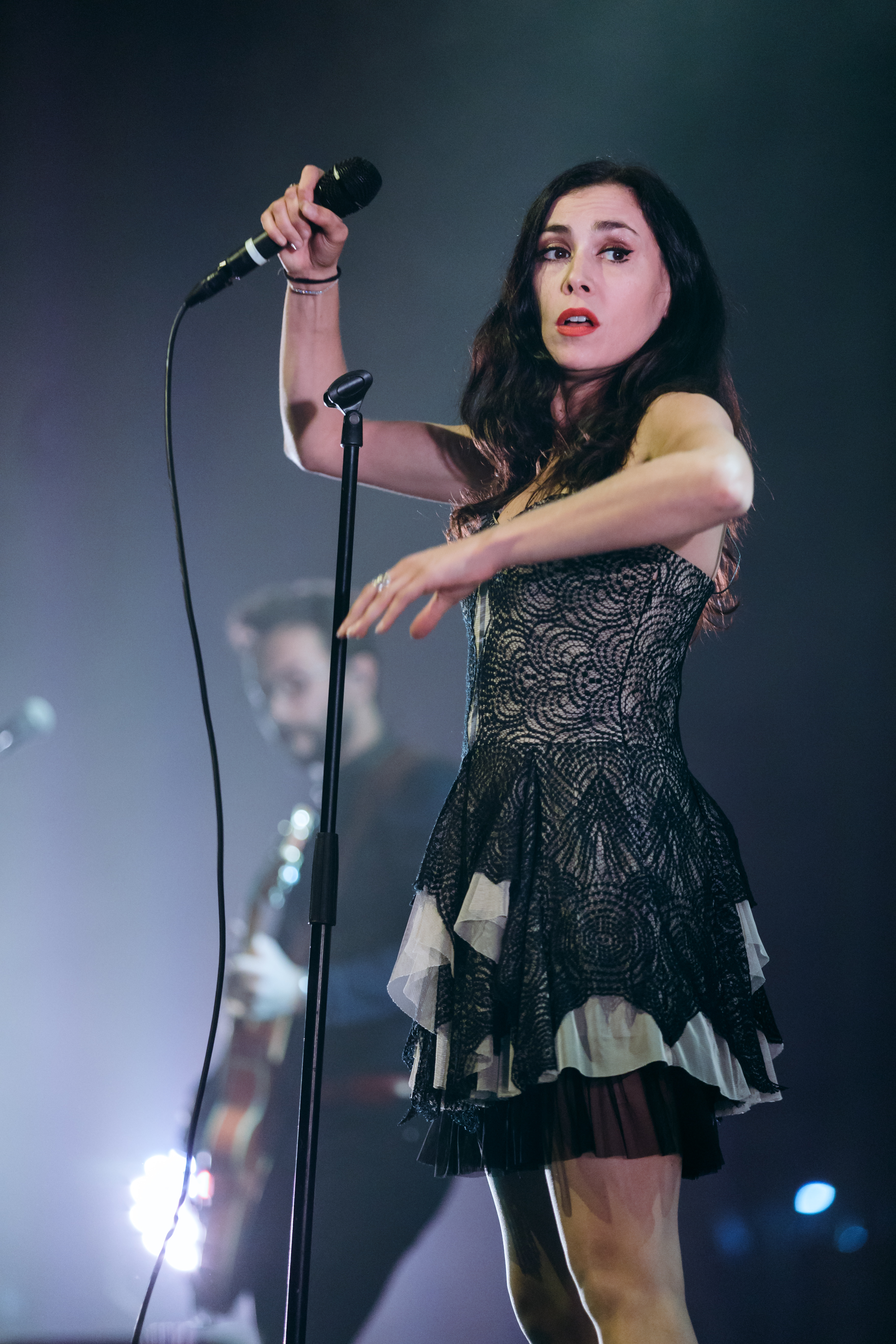 Olivia Ruiz en concert à Quimper dans le cadre du festival de Cornouaille le 21 juillet 2017.